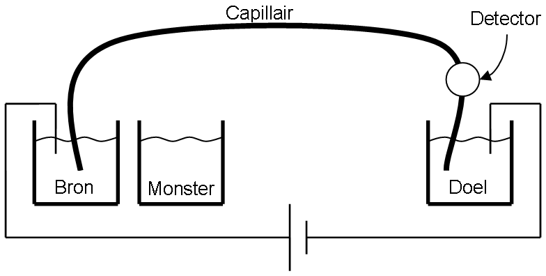 Description Capillaire elektroforese opstelling eigen werk, publiek domein Capillaire elektroforese opstelling